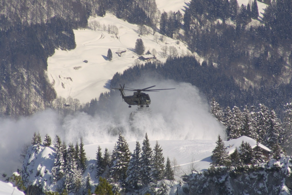 CH-53G bei der Gebirgsflugausbildung